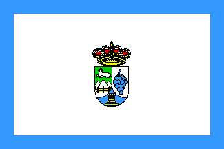 Bandera de Majadahonda, en Madrid (España)